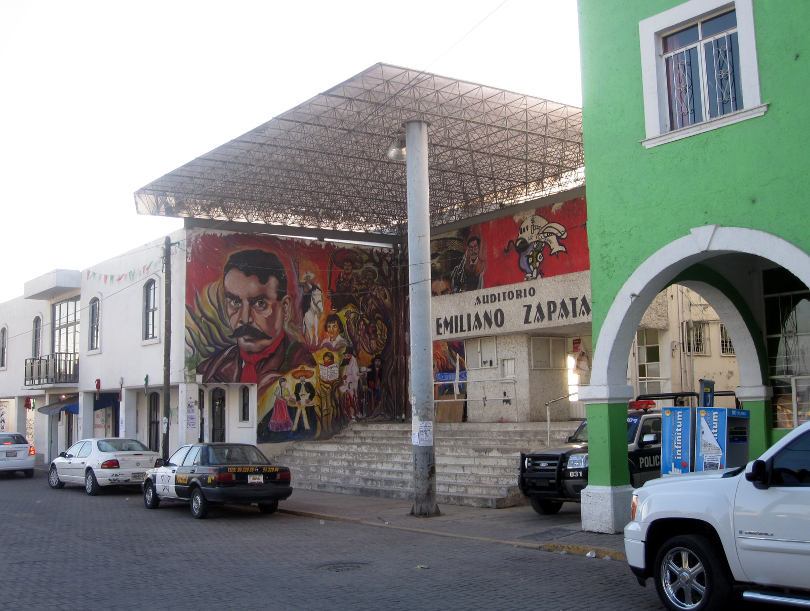 Auditorio Emiliano Zapata i San Salvador Atenco i Mexico